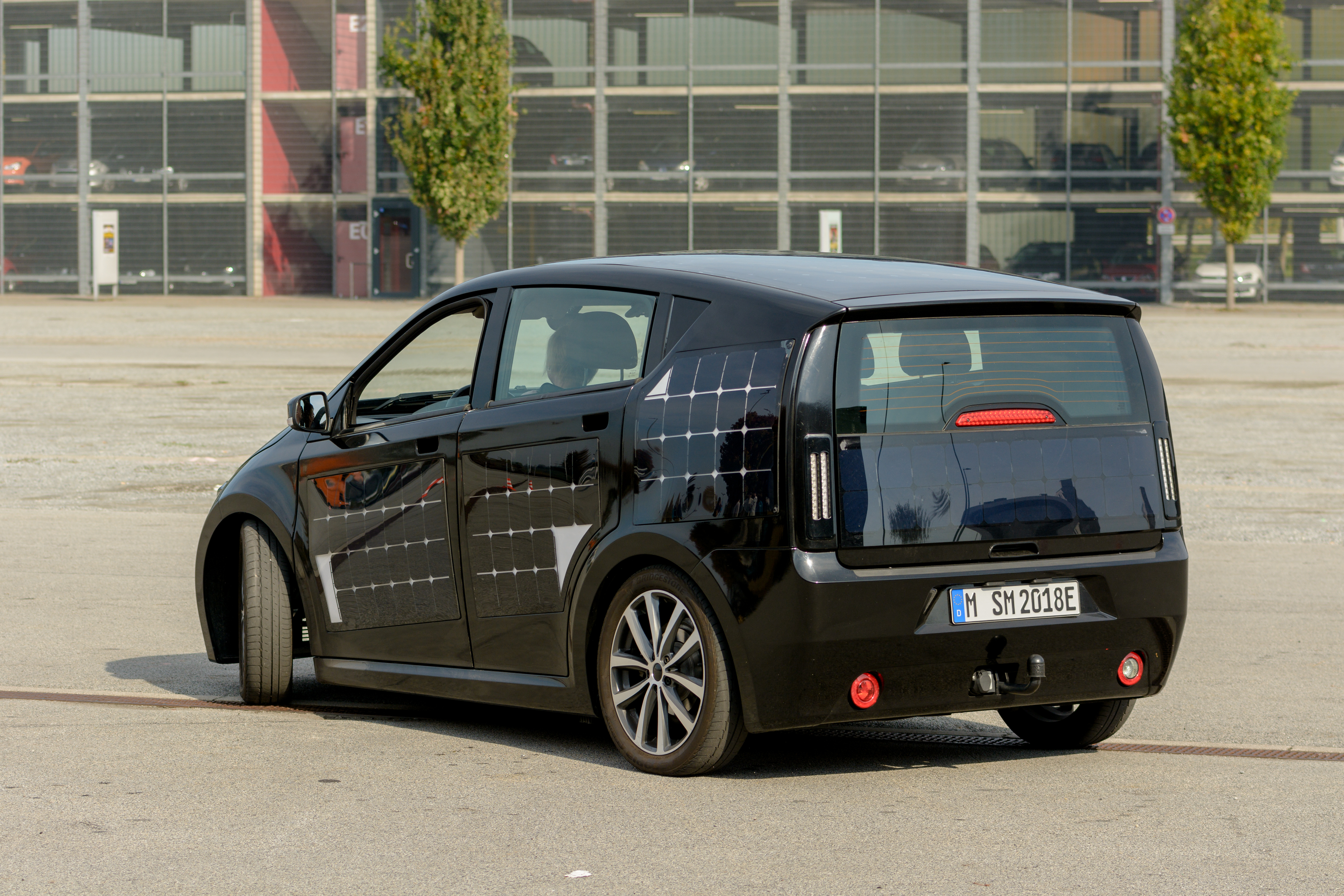 Sono Motors Testfahrten mit Sion Prototyp in Passau